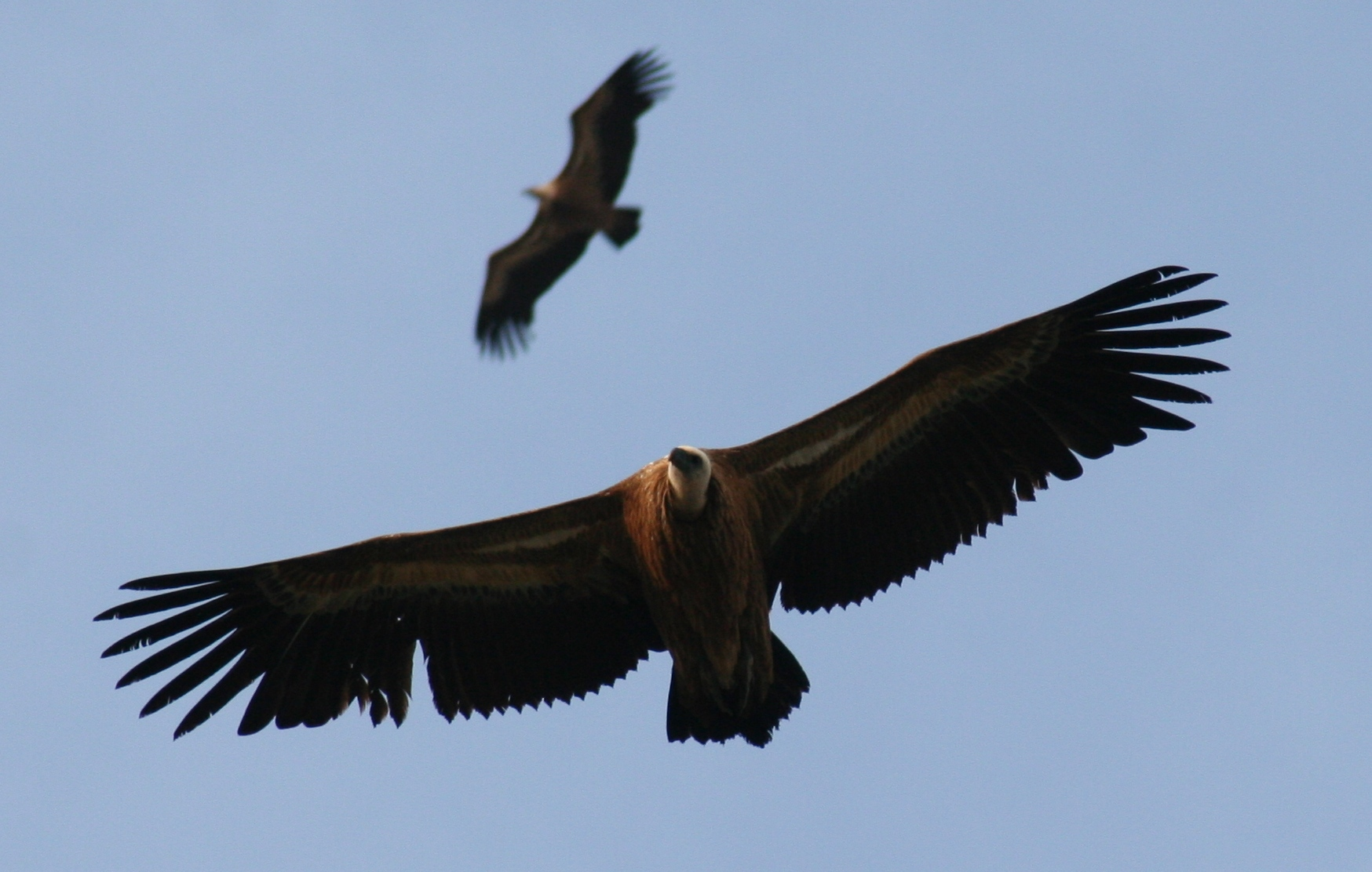 Buitres leonados (Gyps fulvus) volando en el Parque Nacional de Monfragüe, Cáceres (Extremadura, España).